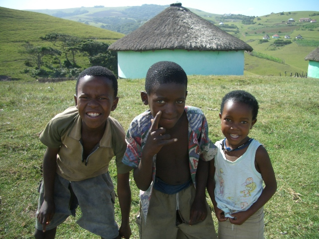 Xhosa- Kinder in der ehemaligen Transkei (genauer: in der Nähe von Coffee Bay, Ostkap, am Rande einer sehr staubigen Straße).